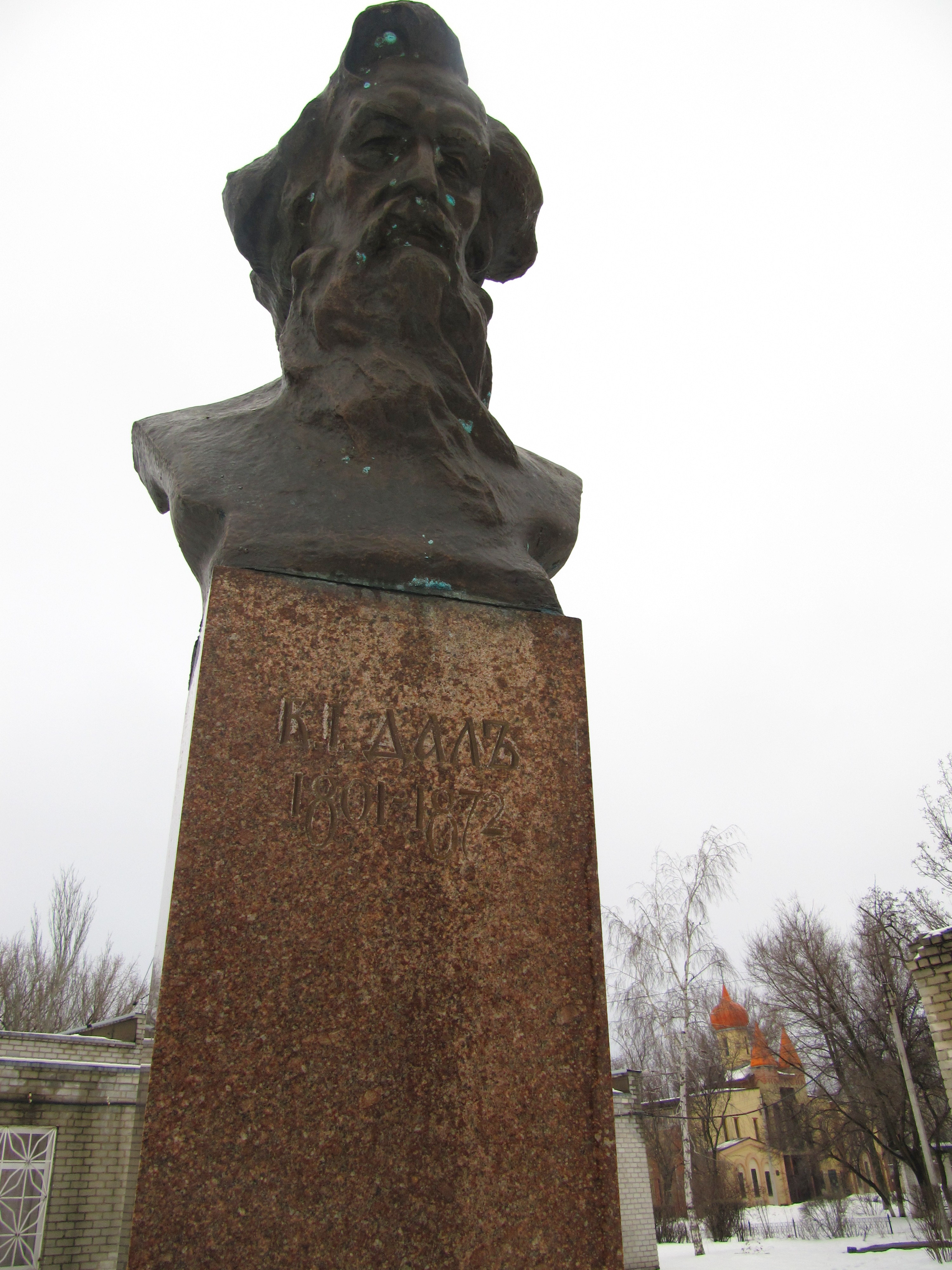 Бюст лікаря-письменника Володимира Даля на території Луганського онкодиспансера.